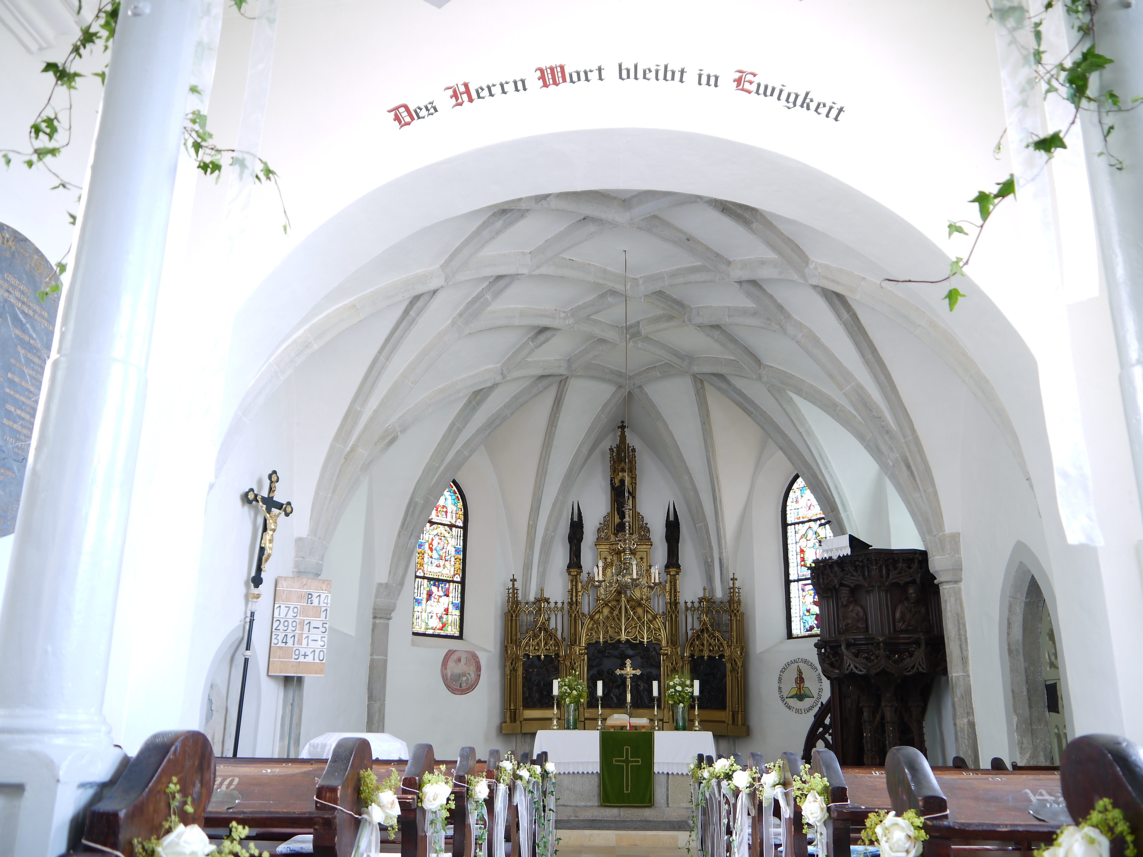 Evang. Filialkirche, Martinskirche und Friedhof